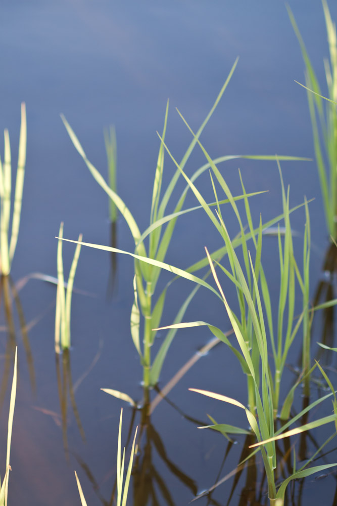 Hänggräs-3940